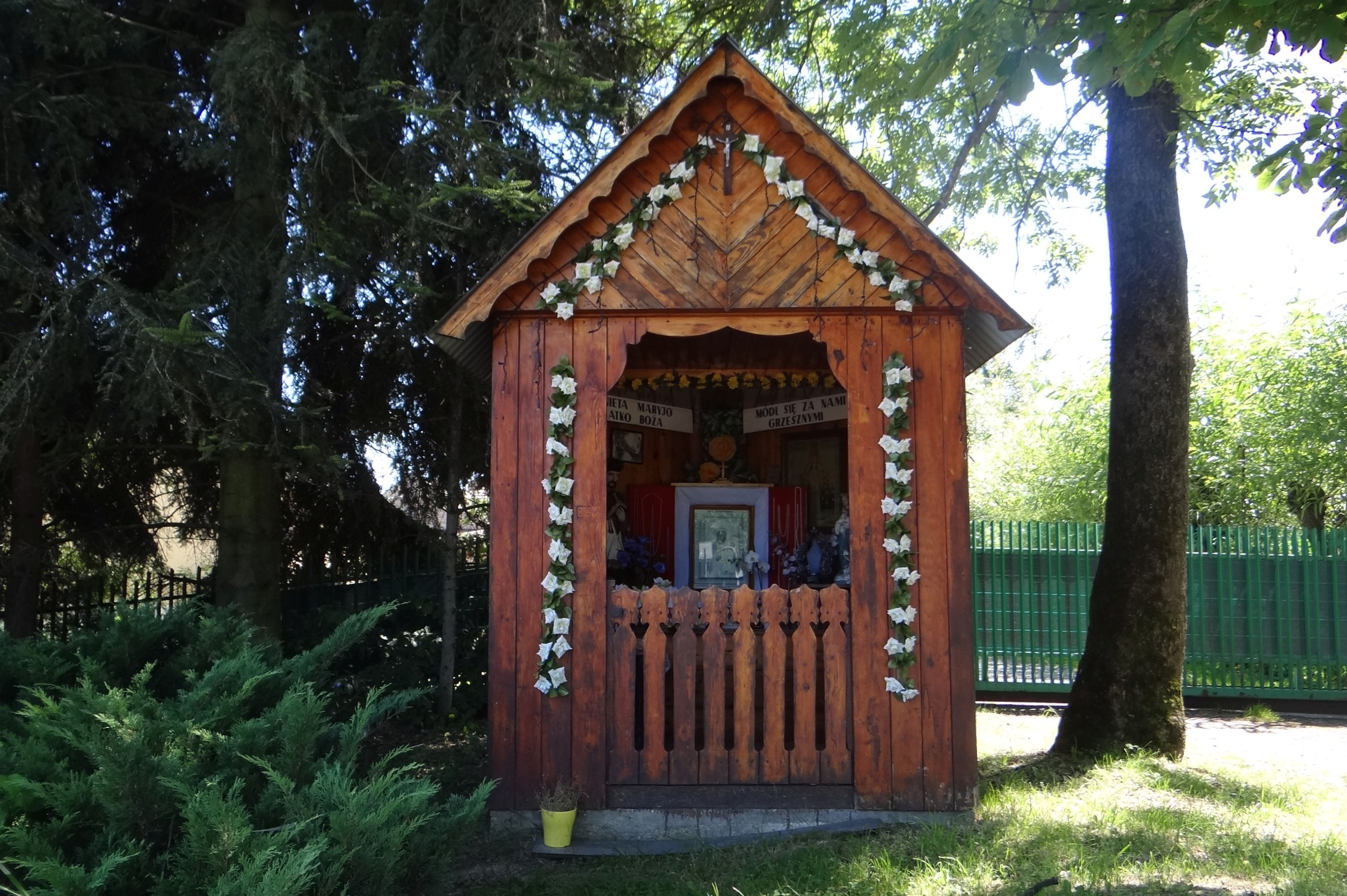 Żerosławice. Kapliczka przy stawie